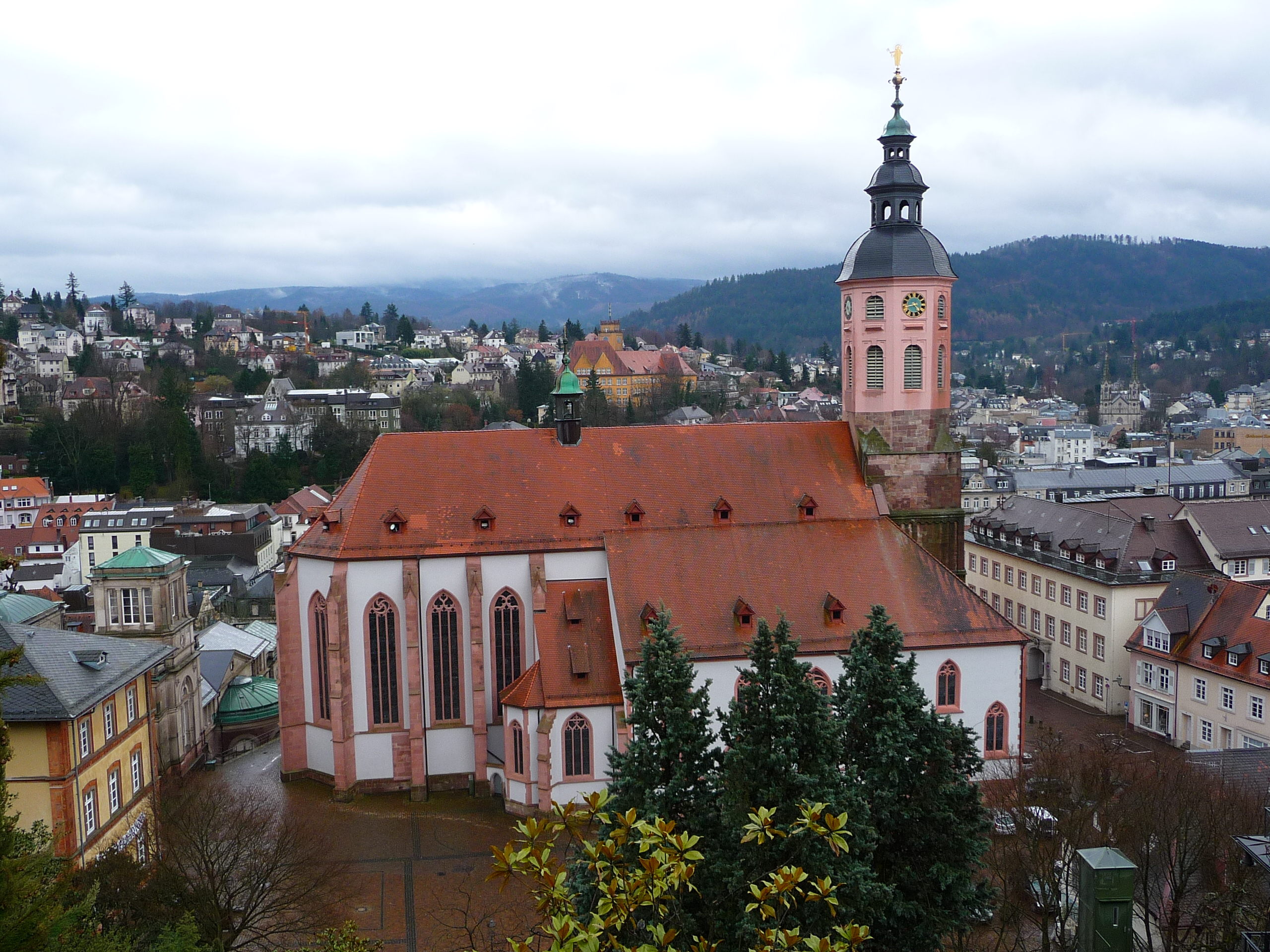 katholische Stiftskirche in Baden-Baden (Baden-Württemberg, Deutschland)